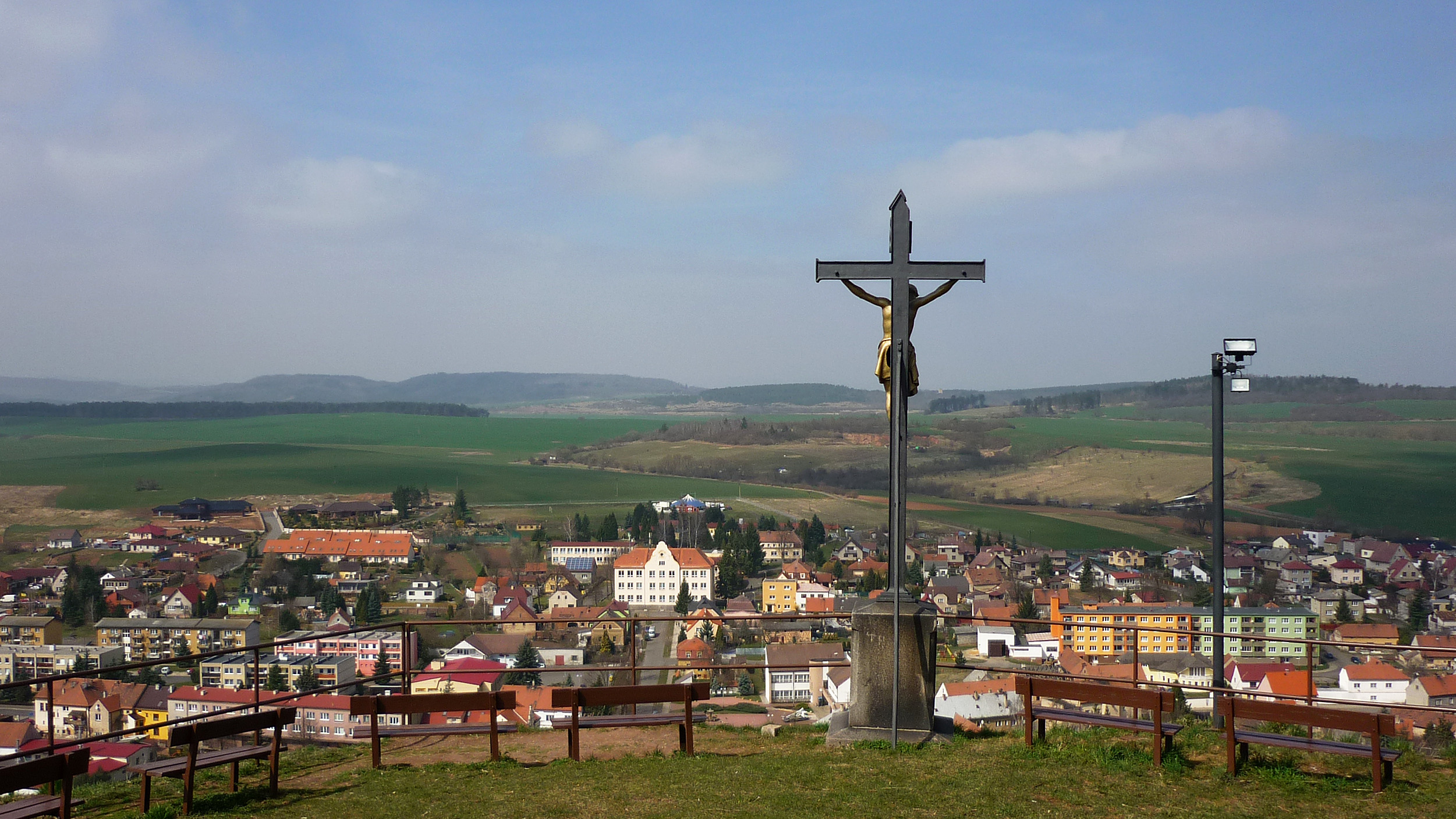 Blick von der Schillerwarte auf Kriegern (Kryry)